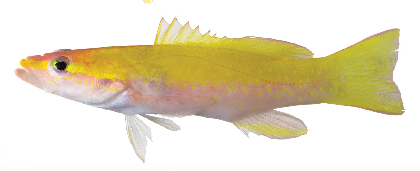 Liopropoma olneyi, holotipo, 84.3 mm, Curaçao